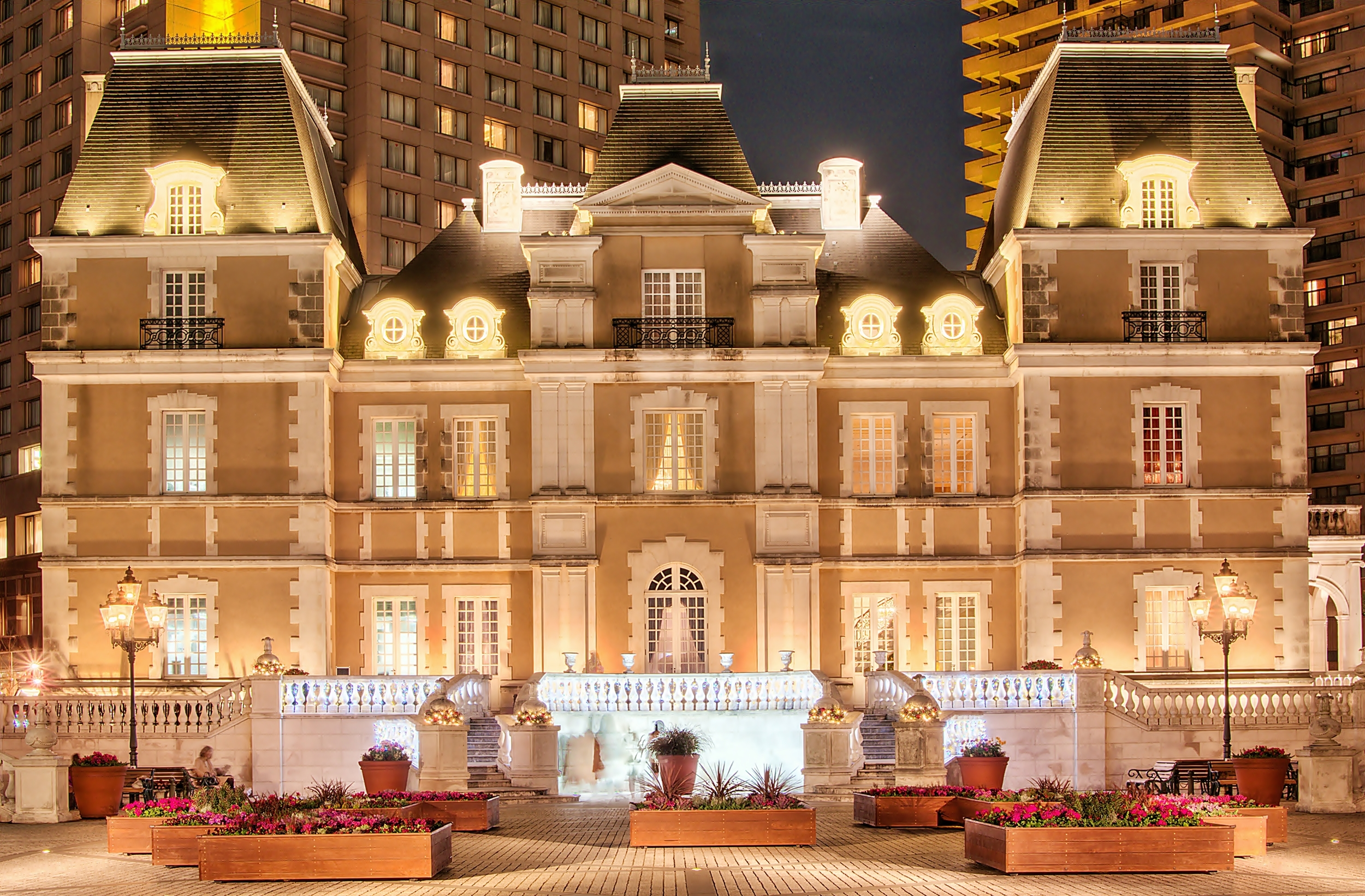 Joël Robuchon's restaurant - Tokyo.ジョエル・ロブションサロン（東京・恵比寿ガーデンプレイス）